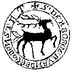 Pieczęć Dobrego Miasta z 1325 roku.